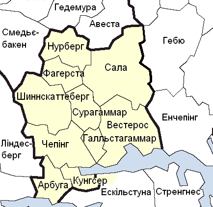 Карта адміністративного поділу лену Вестманланд у Швеції. Карту створено на основі карти File:Västmanland County.png